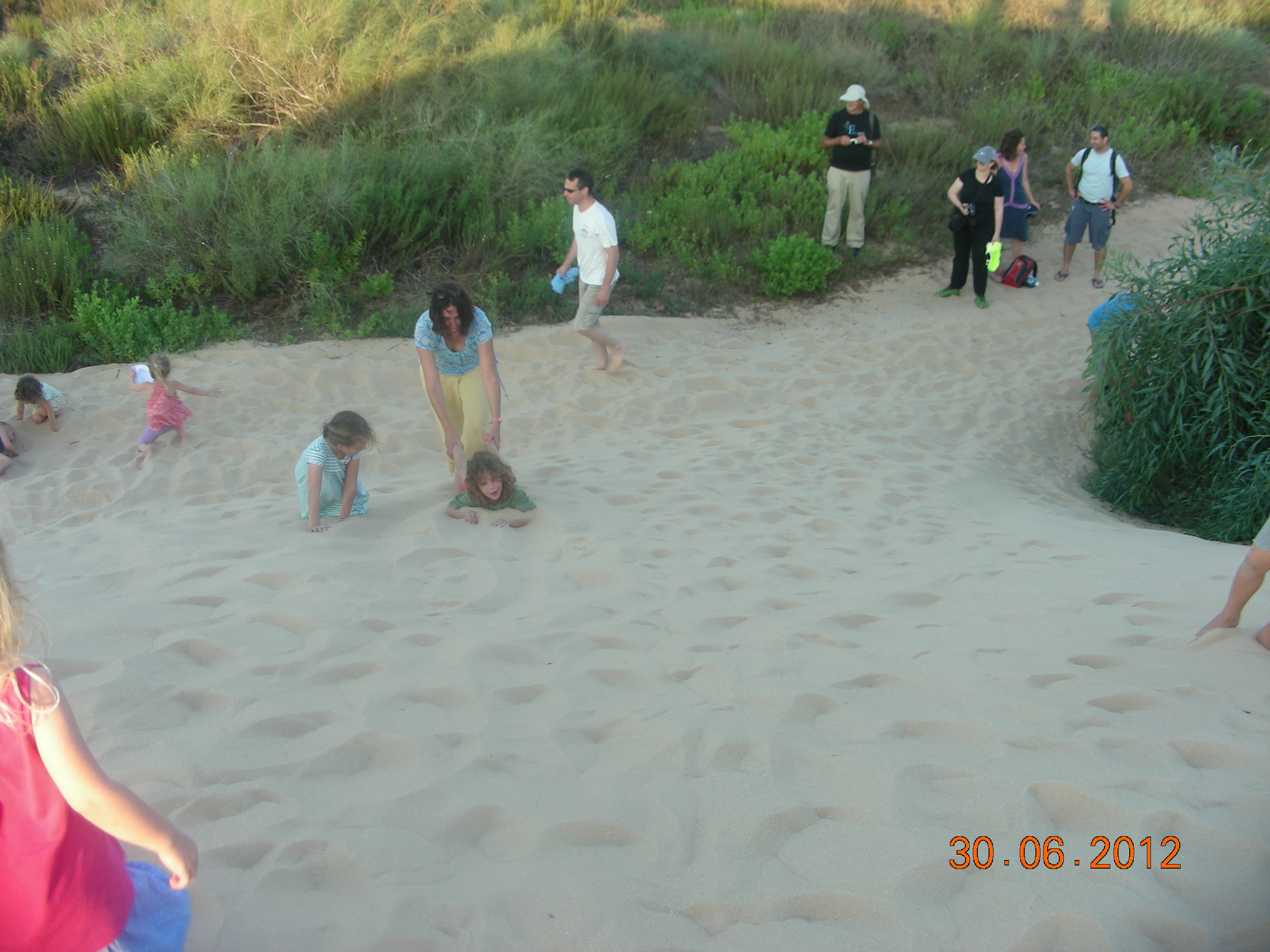 חולות